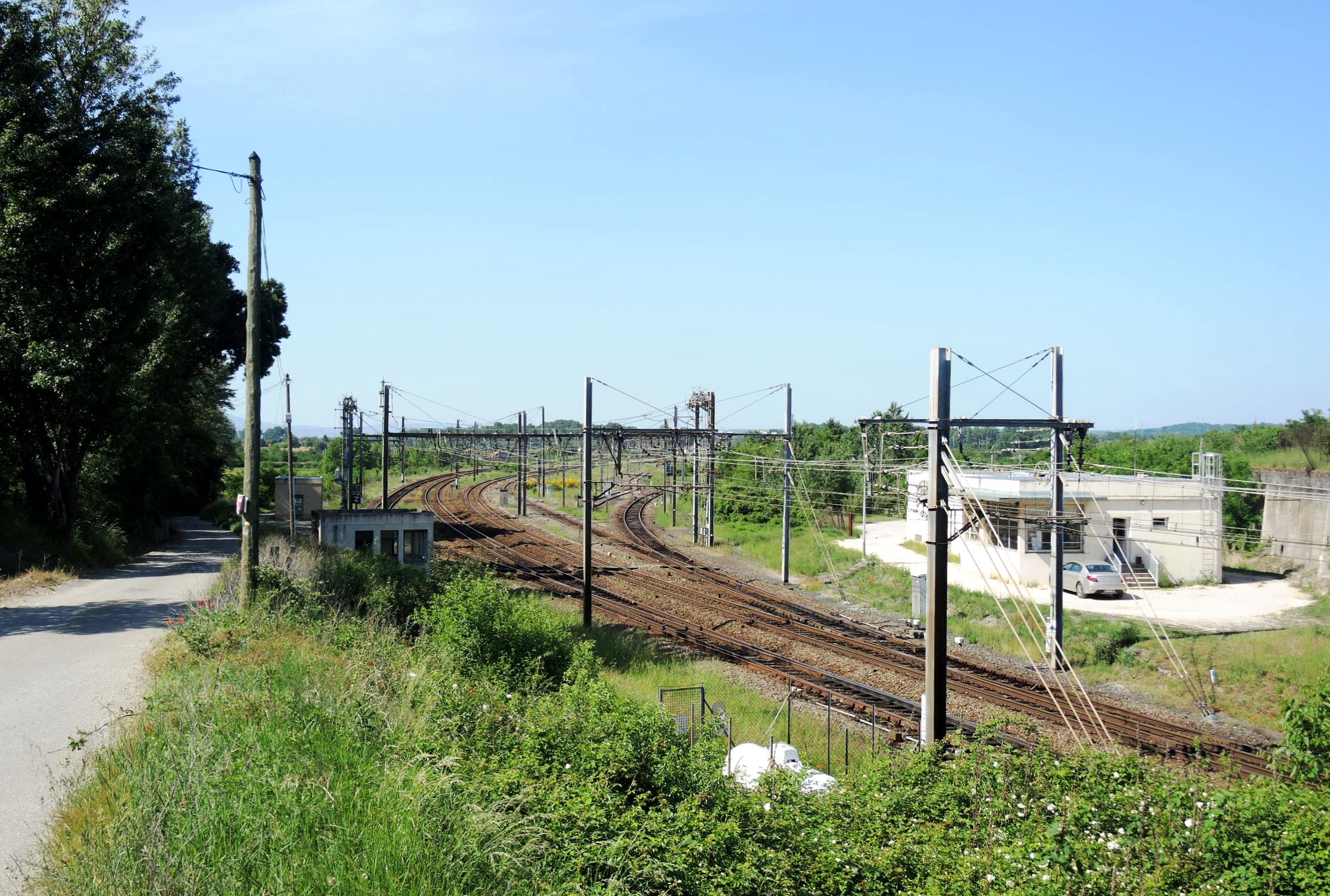 Peyraud détail